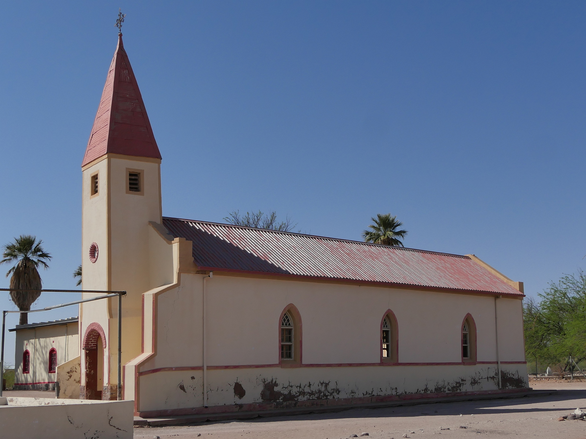 Kirche von Hoachanas